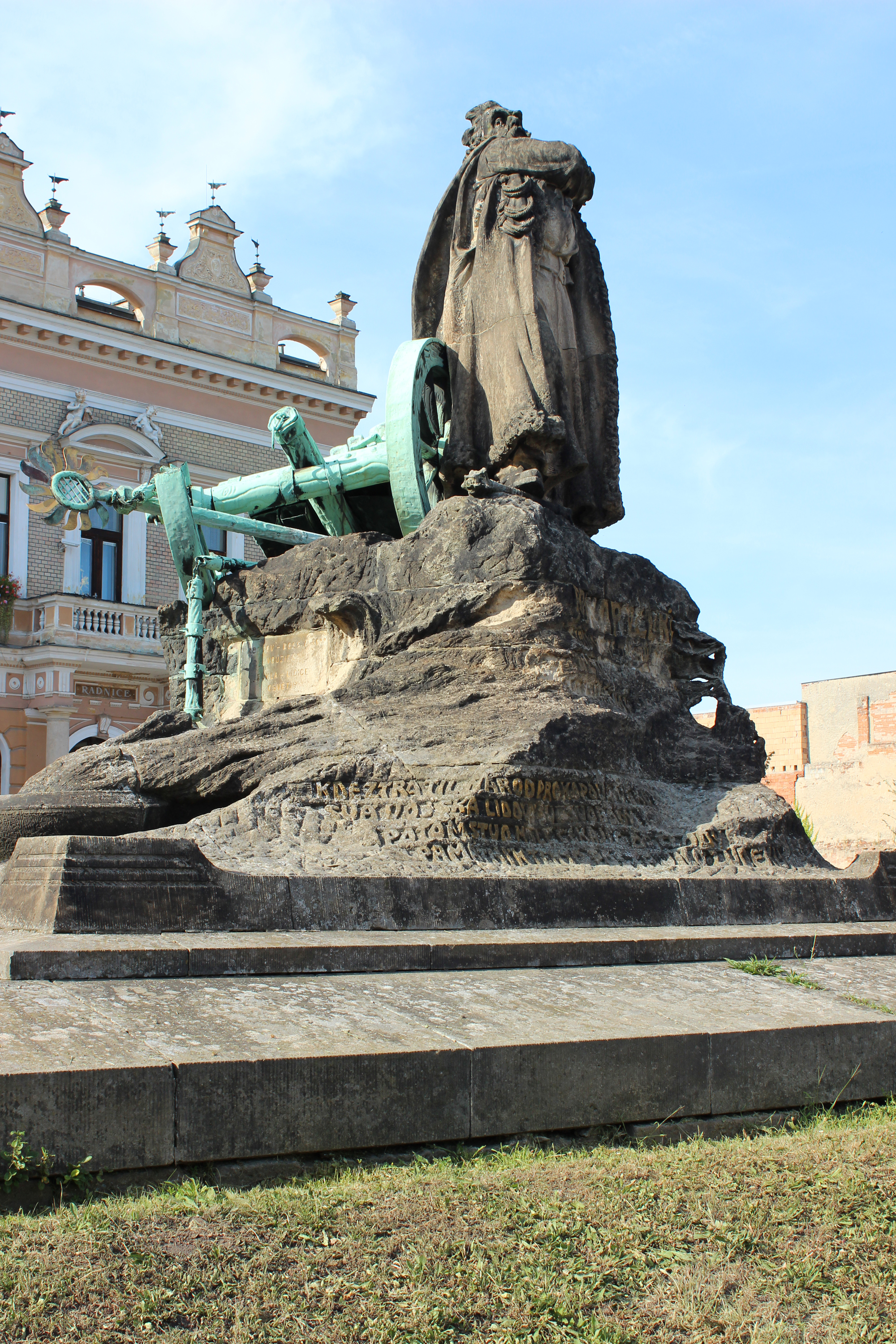 Český Brod, Husovo náměstí, pomník Prokopa Holého